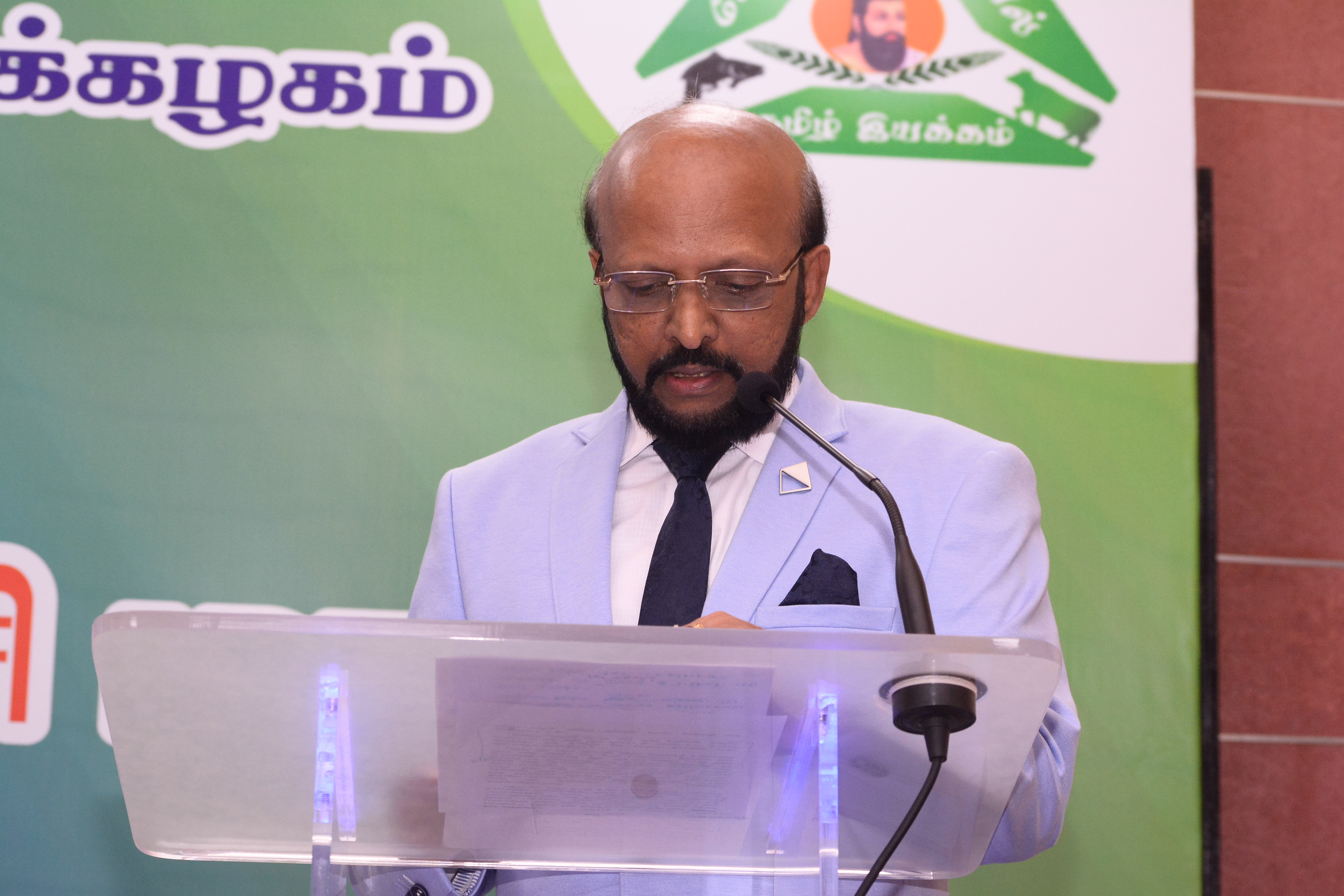 பேராசிரியர் பெலிக்ஸ், துணைவேந்தர், தமிழ்நாடு மீன்வளப்பல்கலைக்கழகம், நாகப்பட்டினம், தமிழ்நாடு.